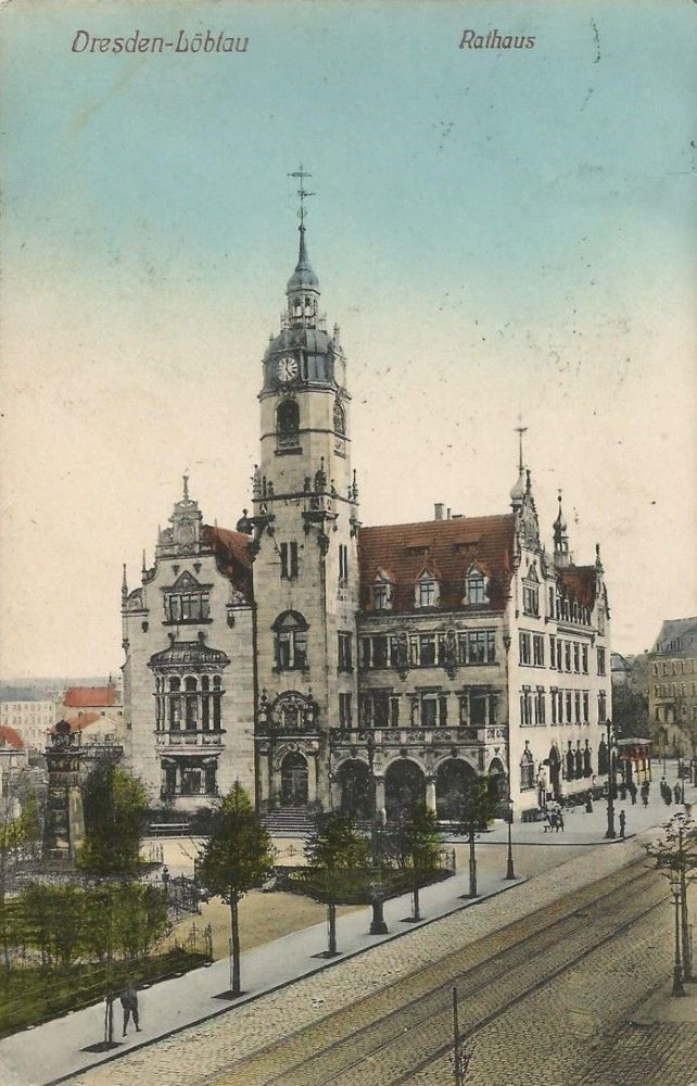 Handkolorierte Postkarte (um 1900)